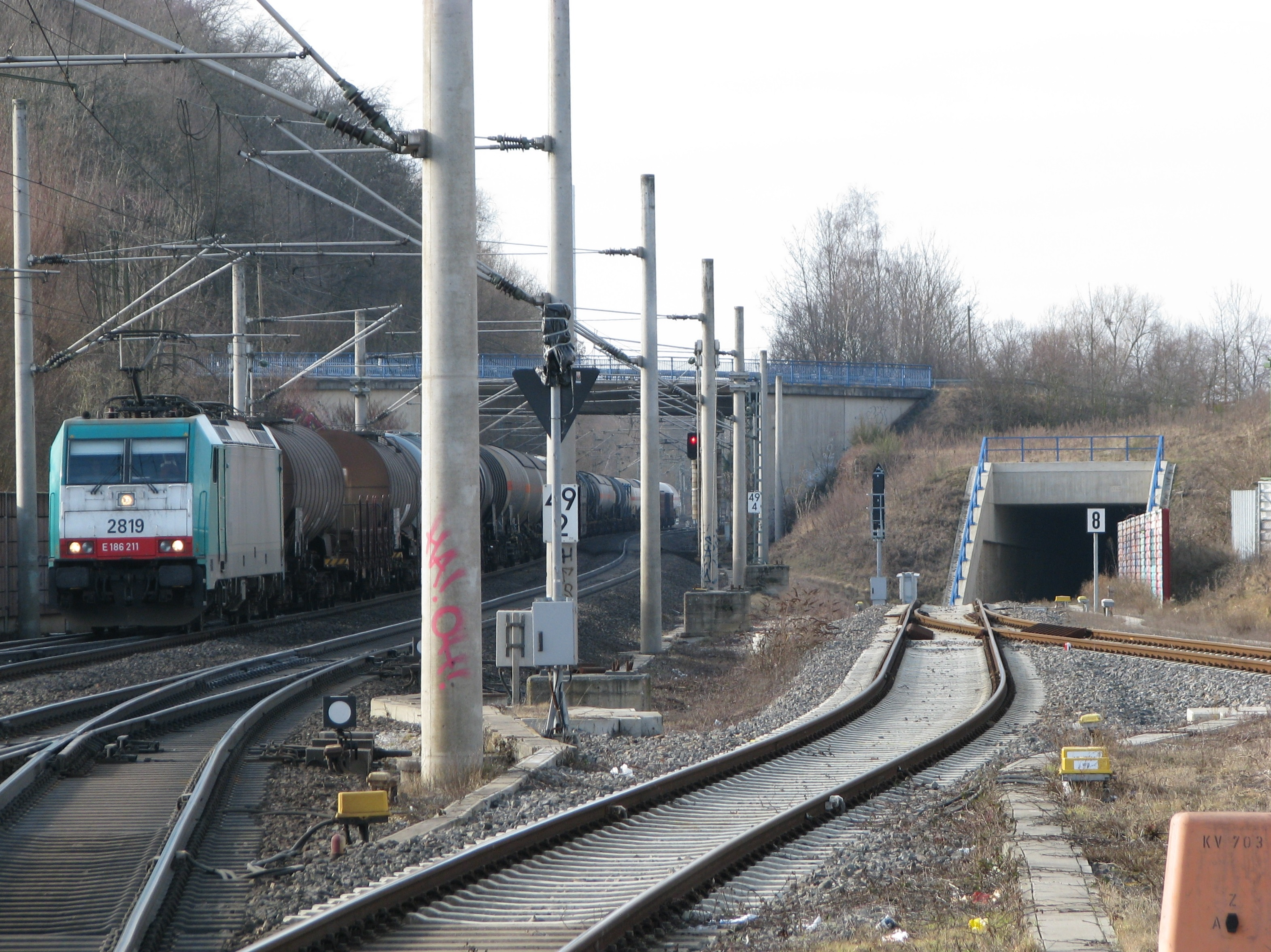 Ostportal des 285m langen Ulhaustunnels am Westkopf des Bahnhofs Langerwehe an der Bahnstrecke Eschweiler-Weisweiler – Langerwehe. Links auf der Schnellfahrstrecke Köln–Aachen befindet sich ein Güterzug mit einer belgischen Mehrsystemlokomotive Bombardier Traxx BR186 von Alpha Trains.